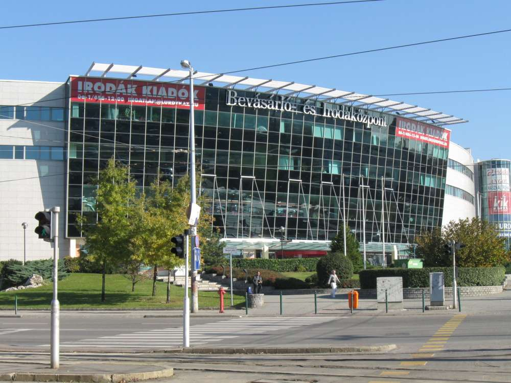 Lurdy-ház (Budapest, IX. ker., Könyves Kálmán körút 12-14.)